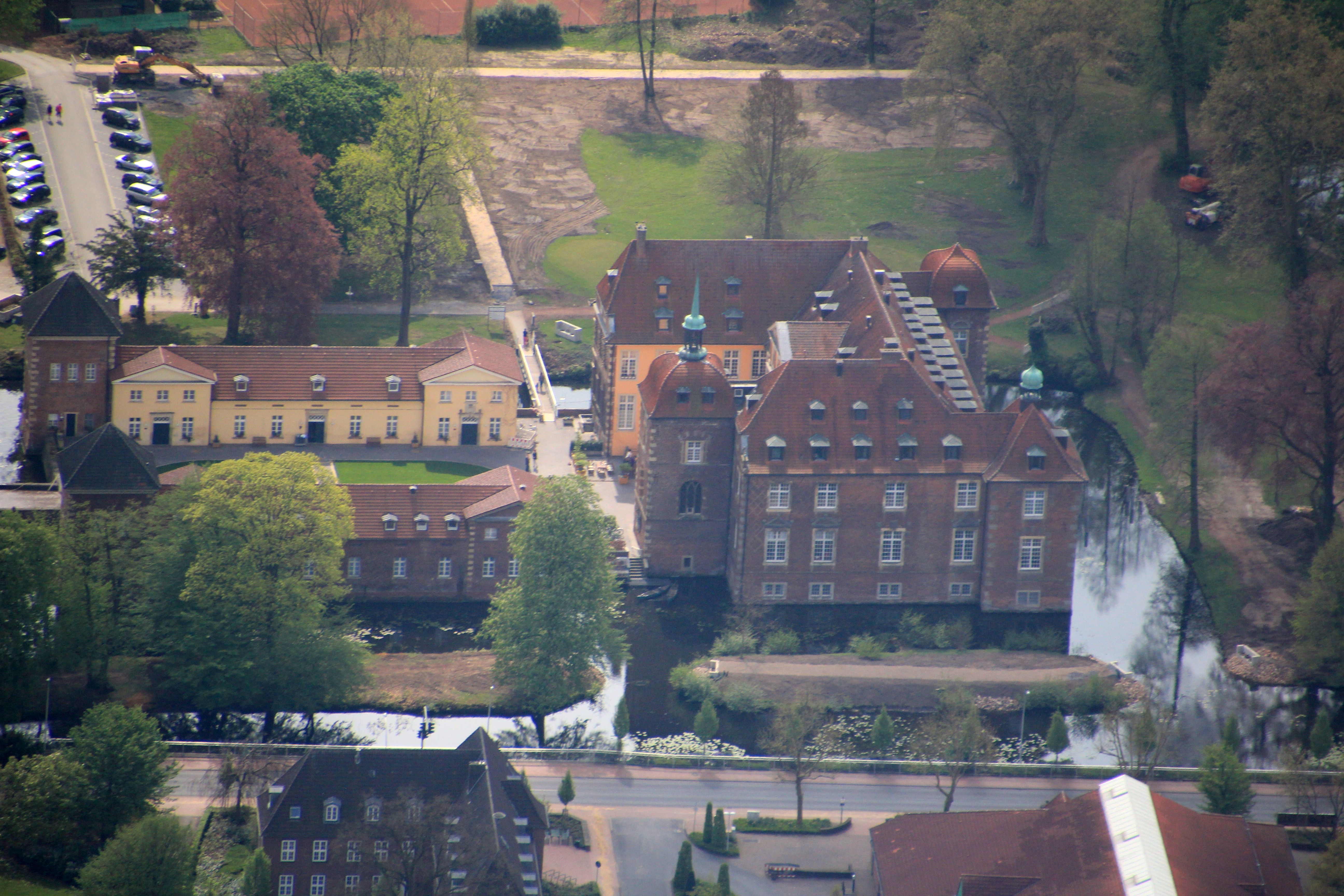 Schloss Velen in der münsterländischen Stadt Velen, Kreis Borken, Nordrhein-Westfalen, Deutschland. Die Aufnahme entstand während des Münsterland-Fotoflugs am 12. April 2014.